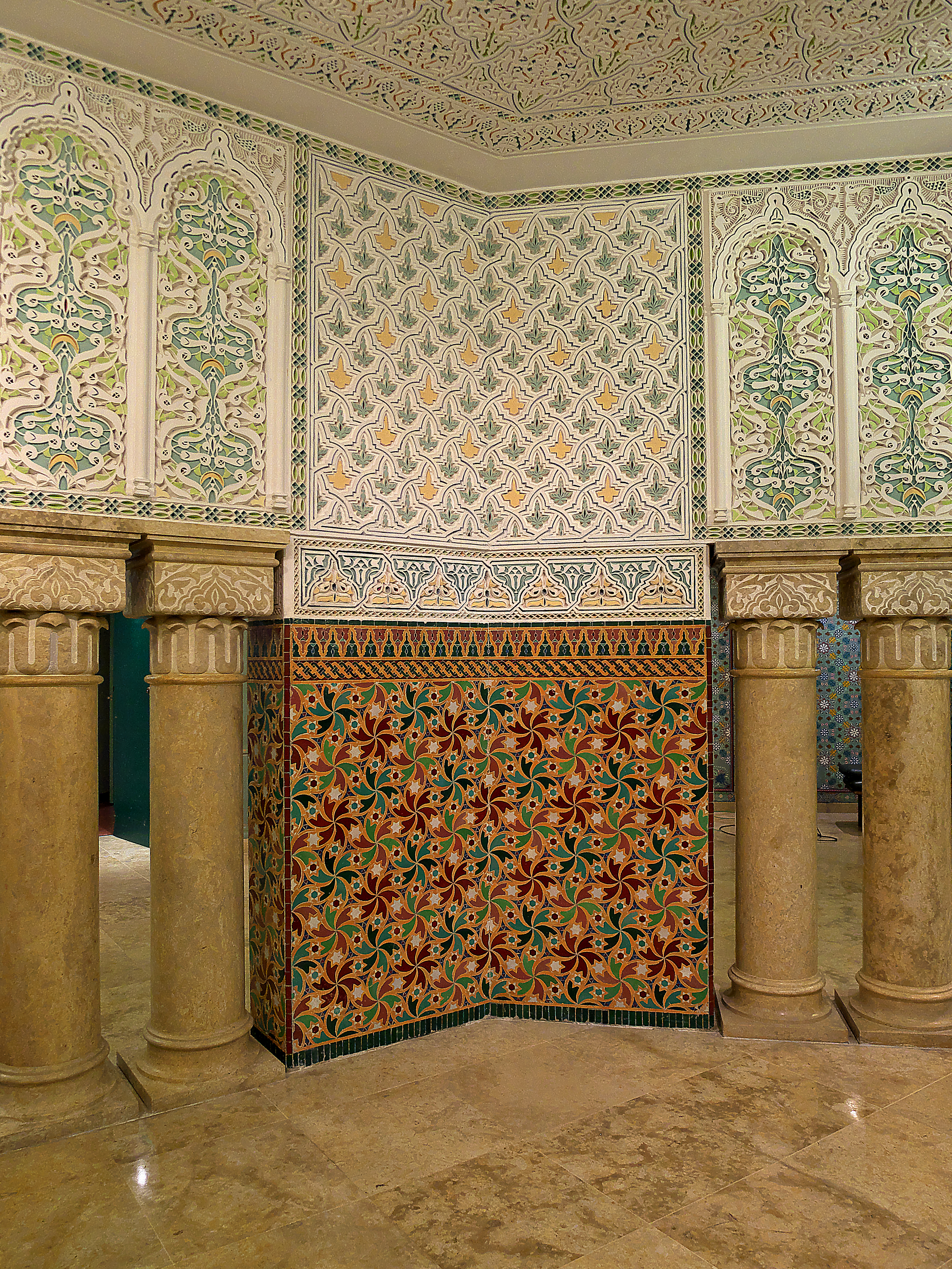 Elementos decorados con gebs y zellij.